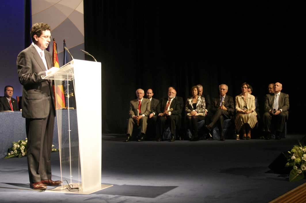 El president Jaume Matas durant el discurs institucional del Dia de les Illes Balears, entrega de Medalles d'Or i Premis Ramon Llull amb els guardonats al fons.